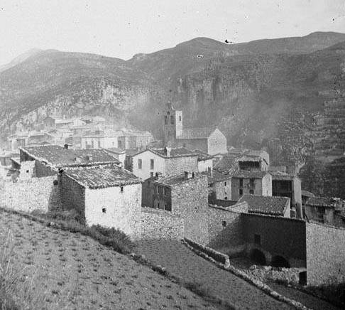 Imatge